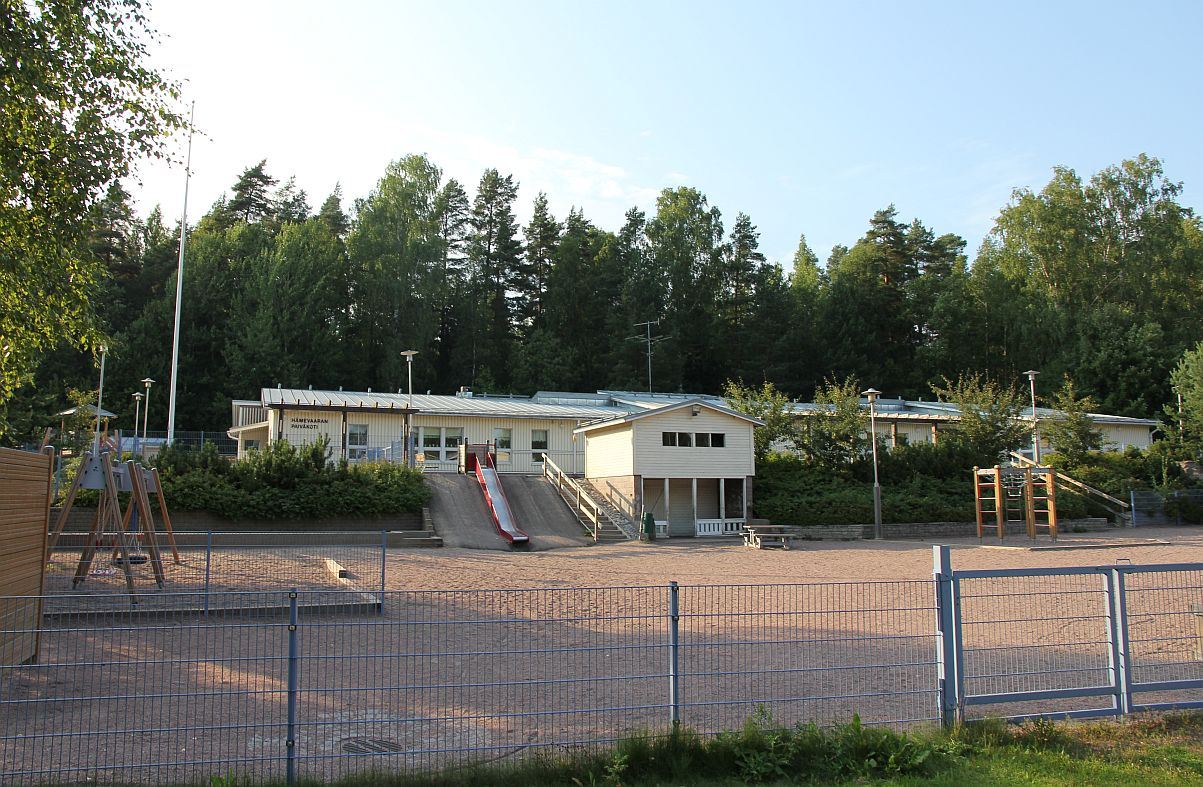 Vantaan Hämevaaran päiväkoti. Huom: Muista säilyttää viittaus kuvaajaan, mikäli käytät kuvaa.